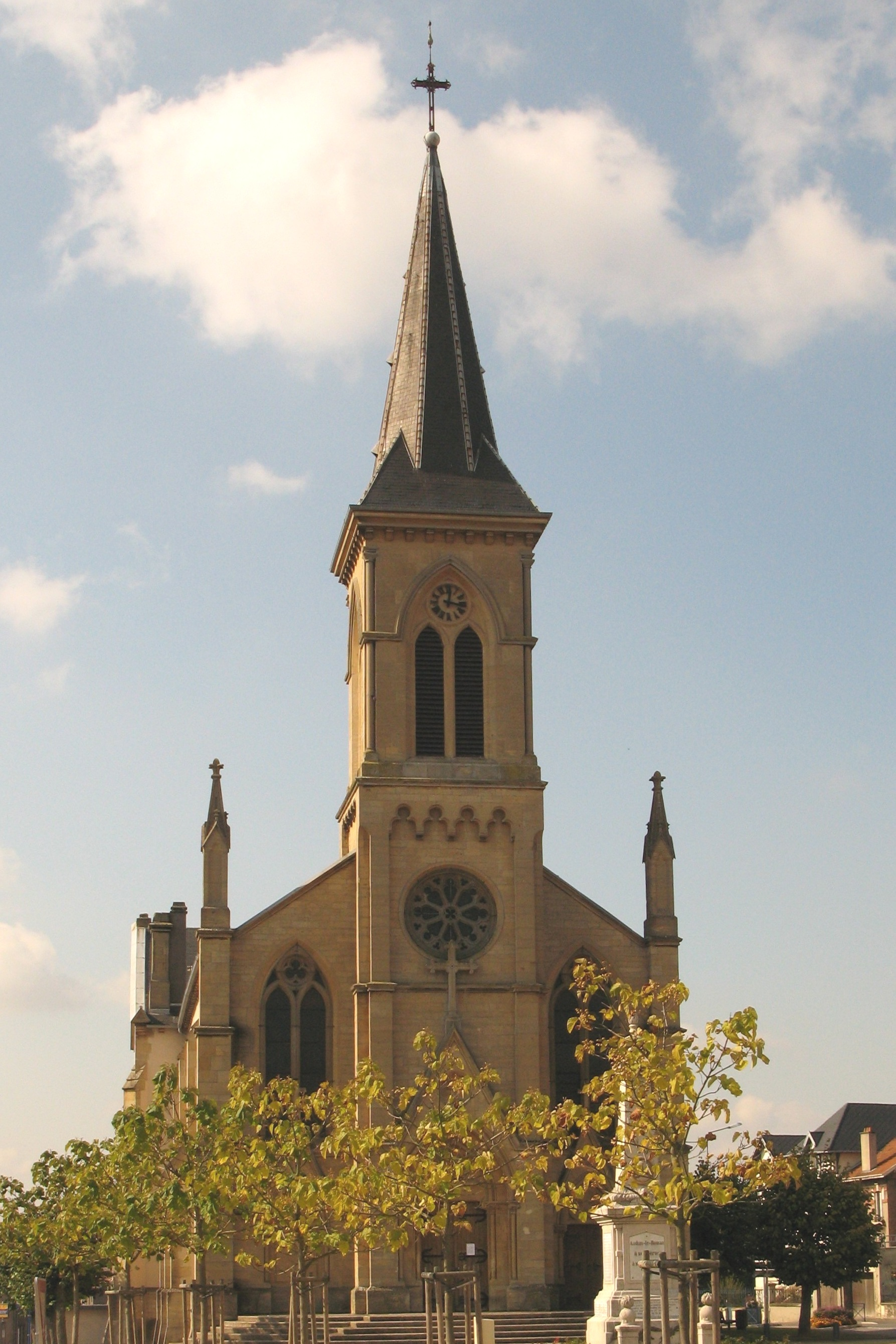 Église d'Audun-le-Roman